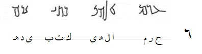 النقش6